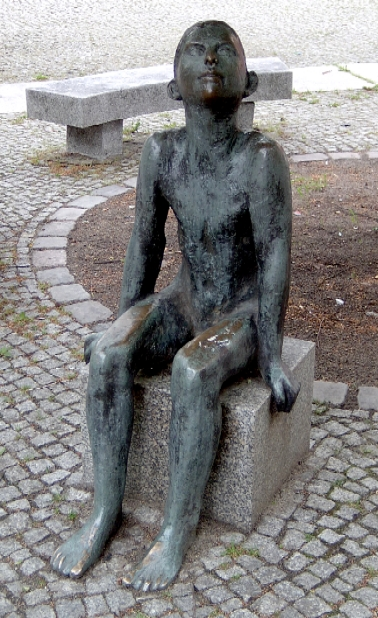 Bildbeschreibung: Bronze "Sitzender Junge" von Werner Stötzer, 1956 in Berlin/Germany Standort: Berlin Prenzlauer Berg, Erich-Weinert-Straße / Hosemannstraße